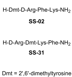 Примеры митохондриально-адресованных SS-пептидов